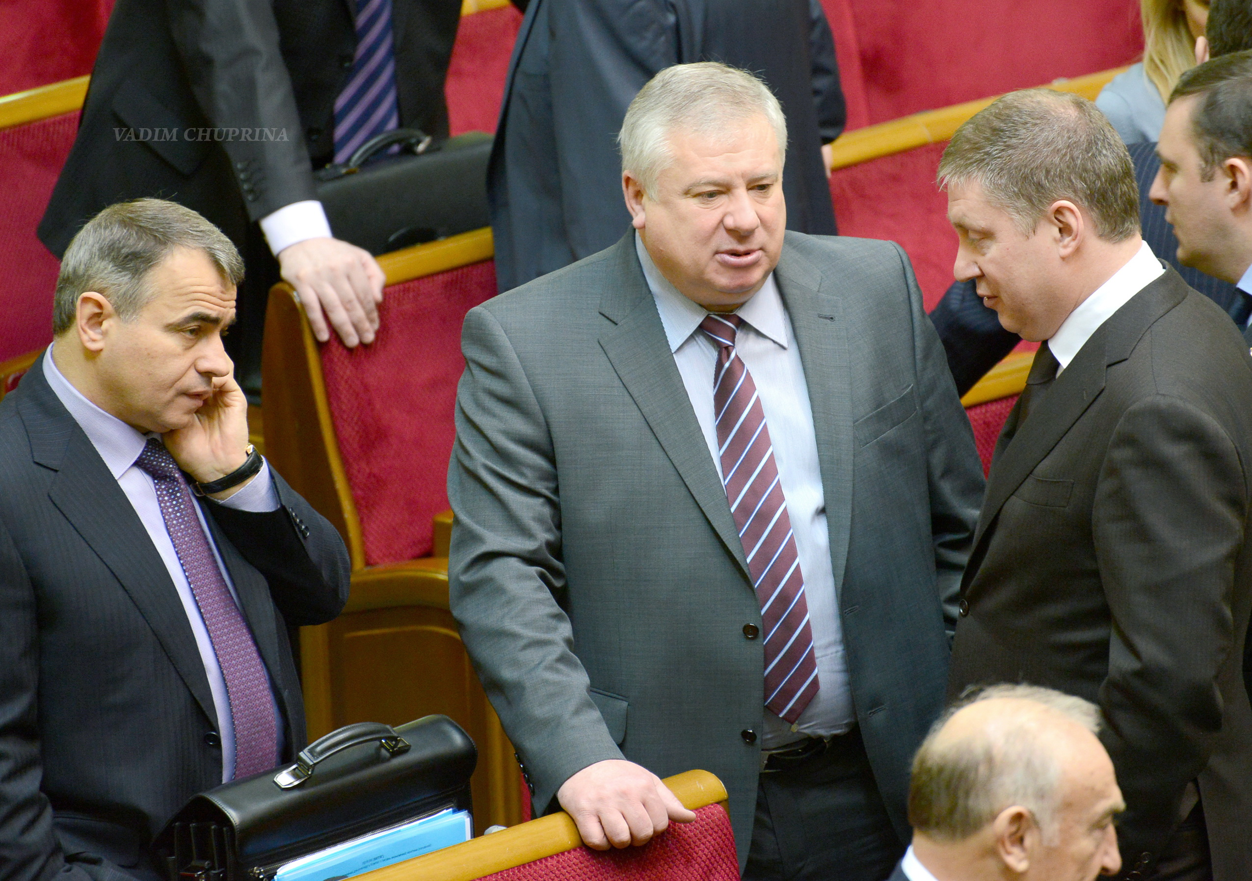 ВЕРХОВНА РАДА УКРАЇНИ 2013 , фото Вадим Чуприна